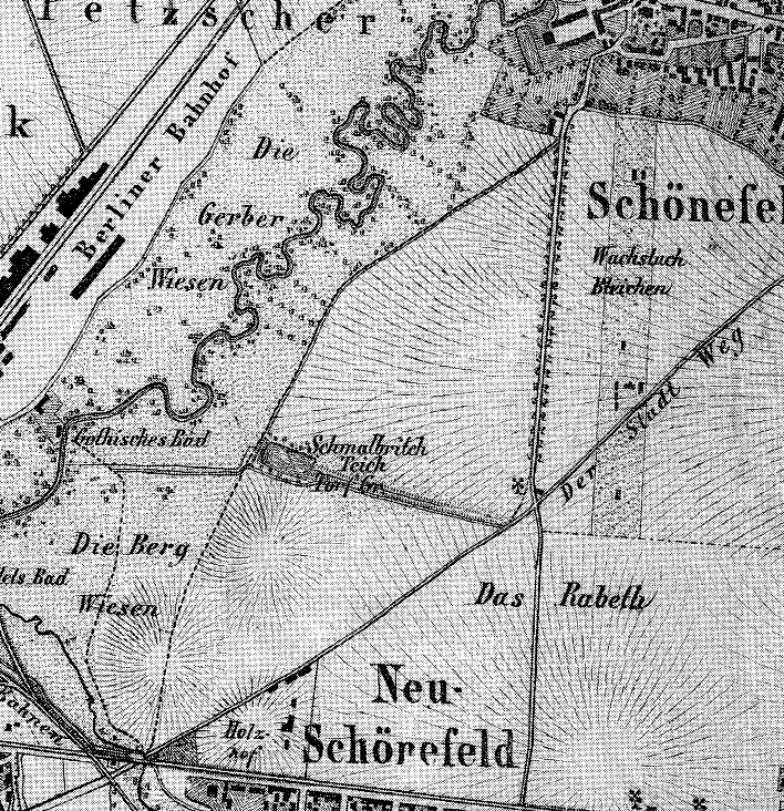 Areal des späteren Mariannenparks in Leipzig-Schönefeld auf einer Karte von 1860